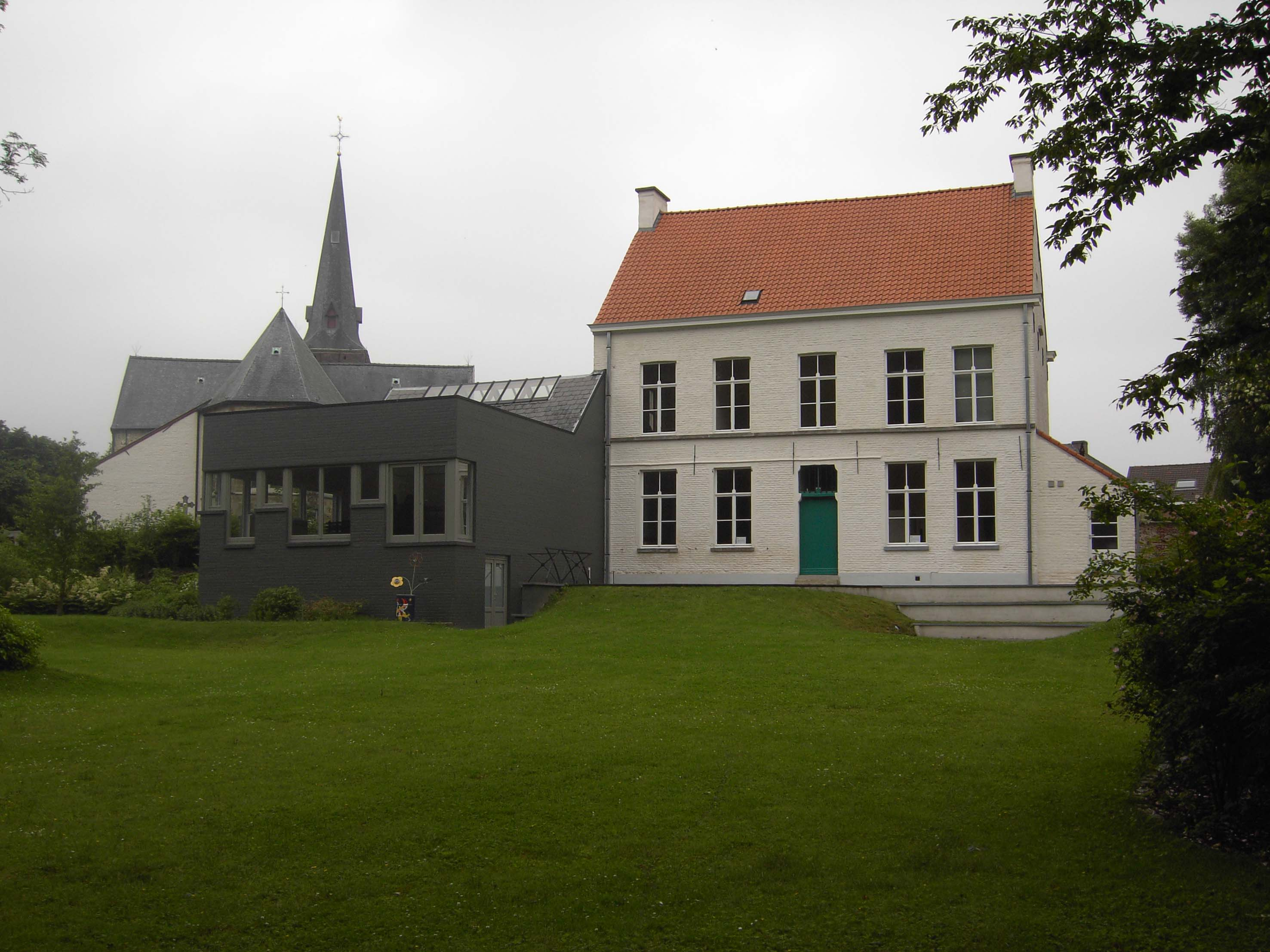 Kerk en Pastorie - Moortsele - Oosterzele - Oost-Vlaanderen - België